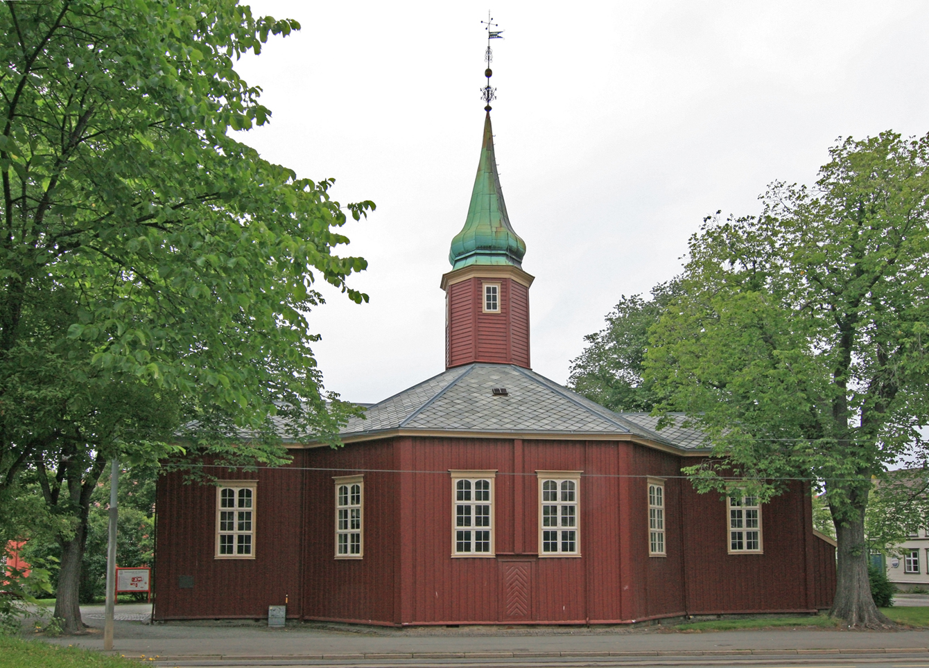 Hospitalskirken, Trondheim. Bygd 1705-1706 av Trondhjems Hospital. Byggmester og arkitekt: Johan Chr. Hempel. Hospitalskirken ble modell for mer enn 80 åttekantede kirker i Norge.